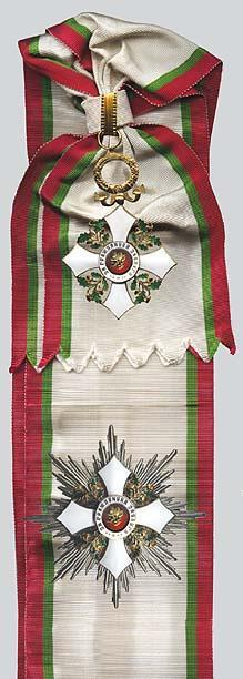 Орден_„За_Гражданска_Заслуга“_I_степен,_регентска_емисия